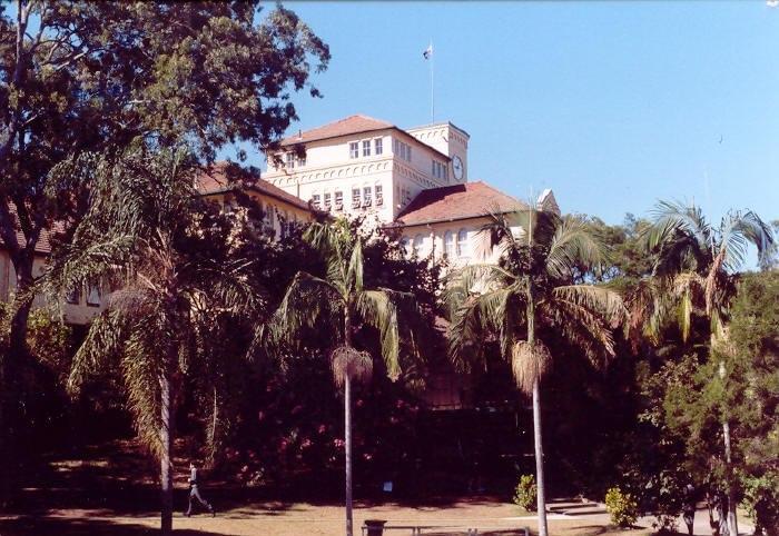 Hauptgebäude des Brisbane Boys' College vom Schulhof aus gesehen